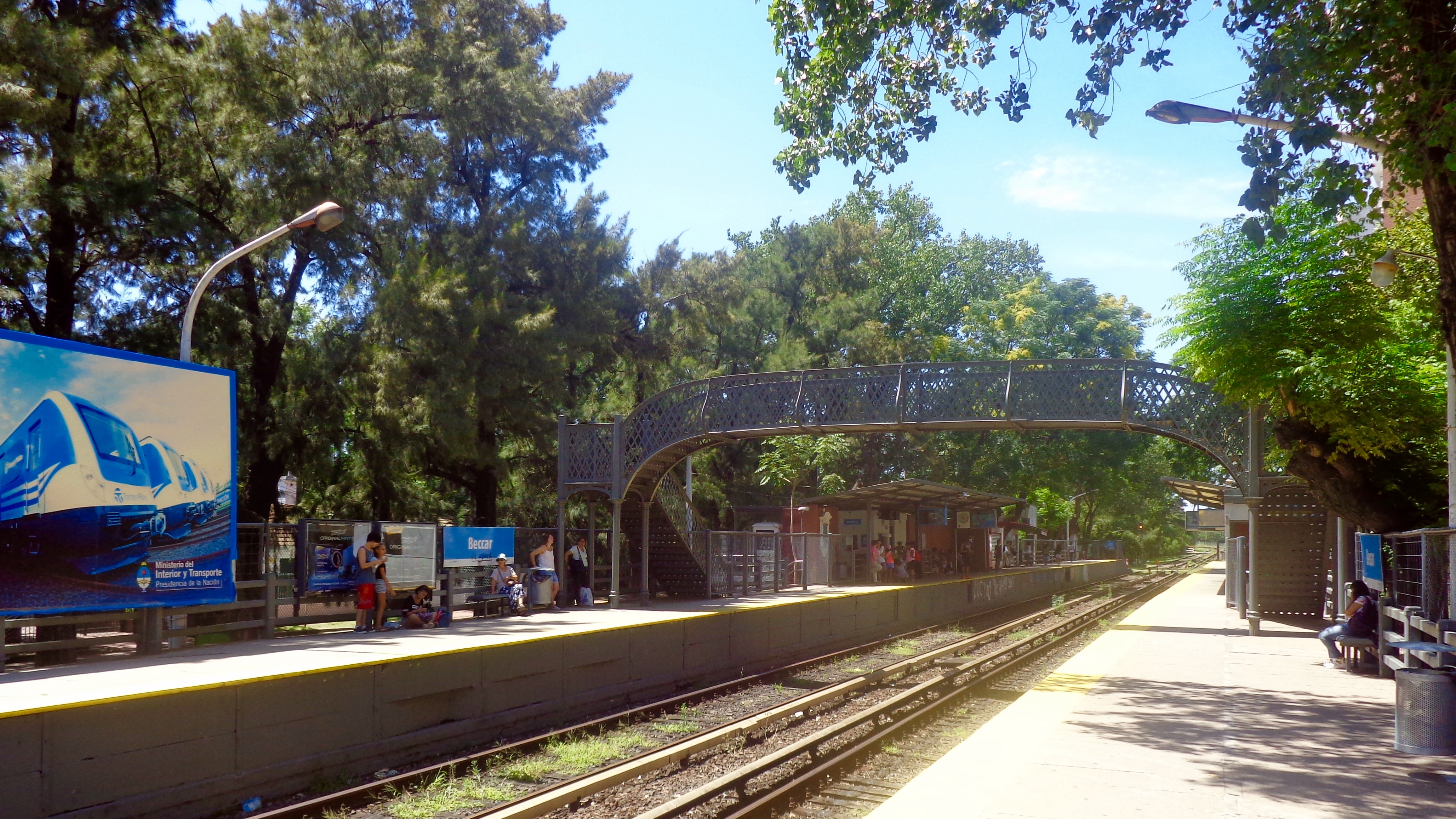 En Avenida Centenario y José Ingenieros, San Isidro, Provincia de Buenos Aires, Argentina.